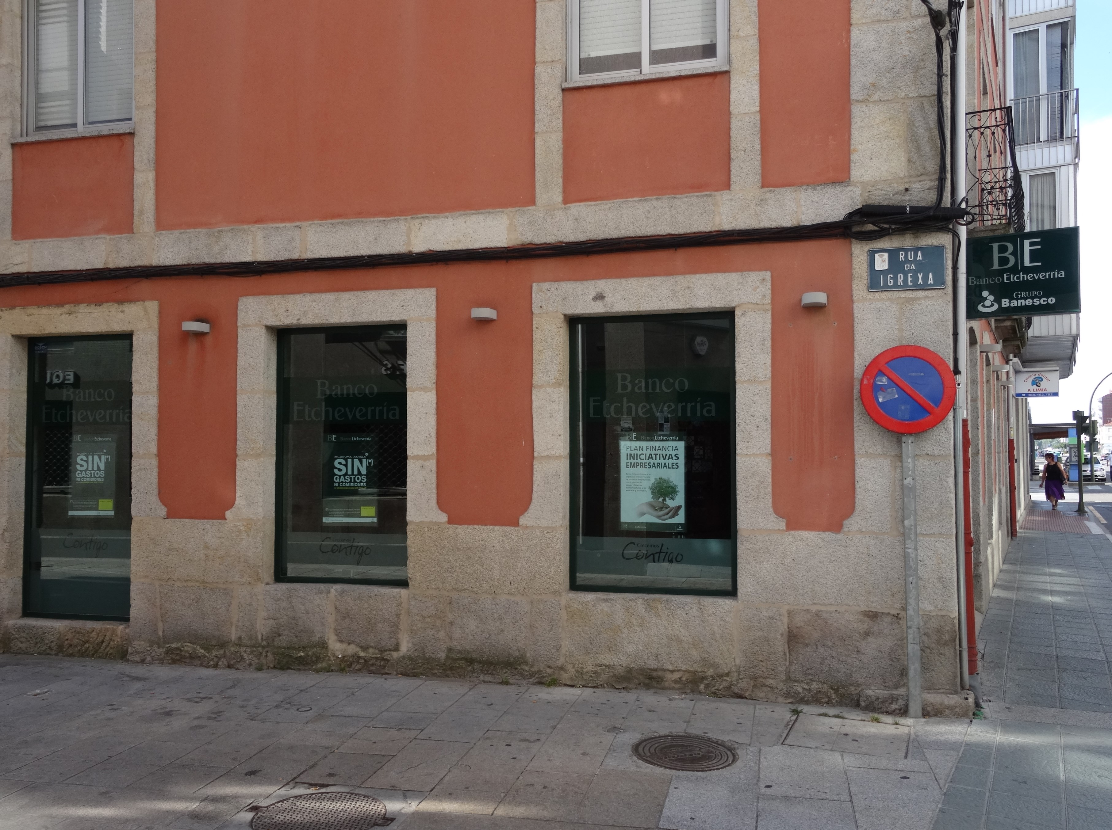 Oficina do Banco Etchevarría en Xinzo de Limia, Ourense.